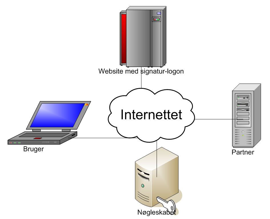 Nøgleskabet integration